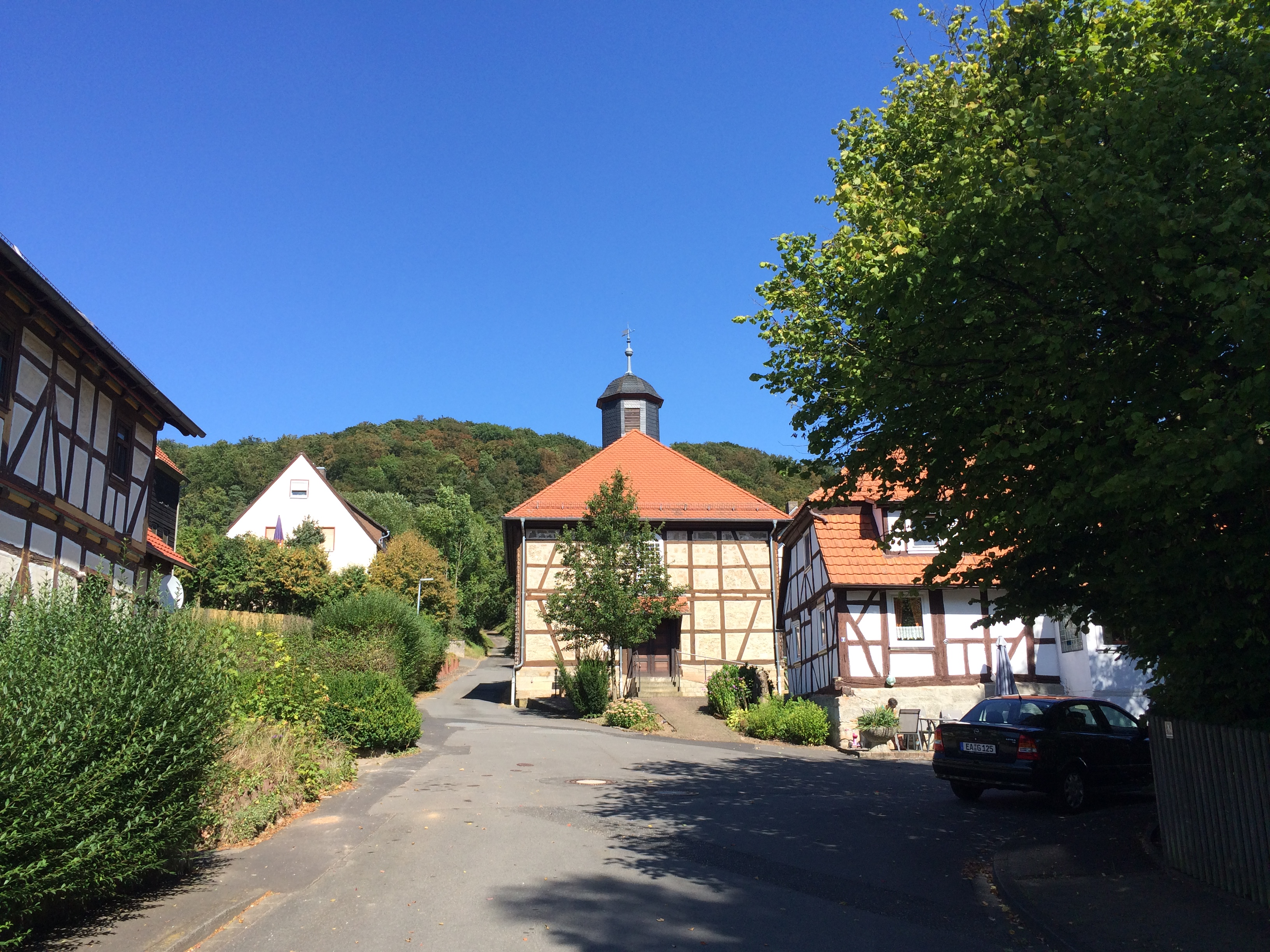 Der Osterlochweg in Markershausen (Herleshausen); in der Bildmitte die Evangelische Kirche Markershausen